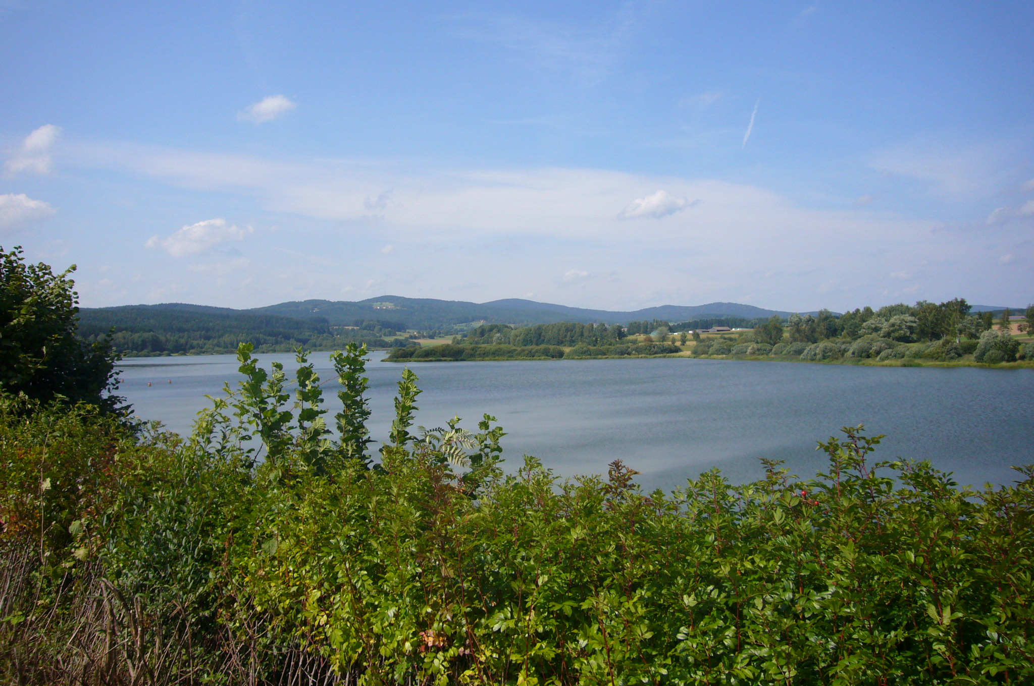 Silbersee bei Tiefenbach